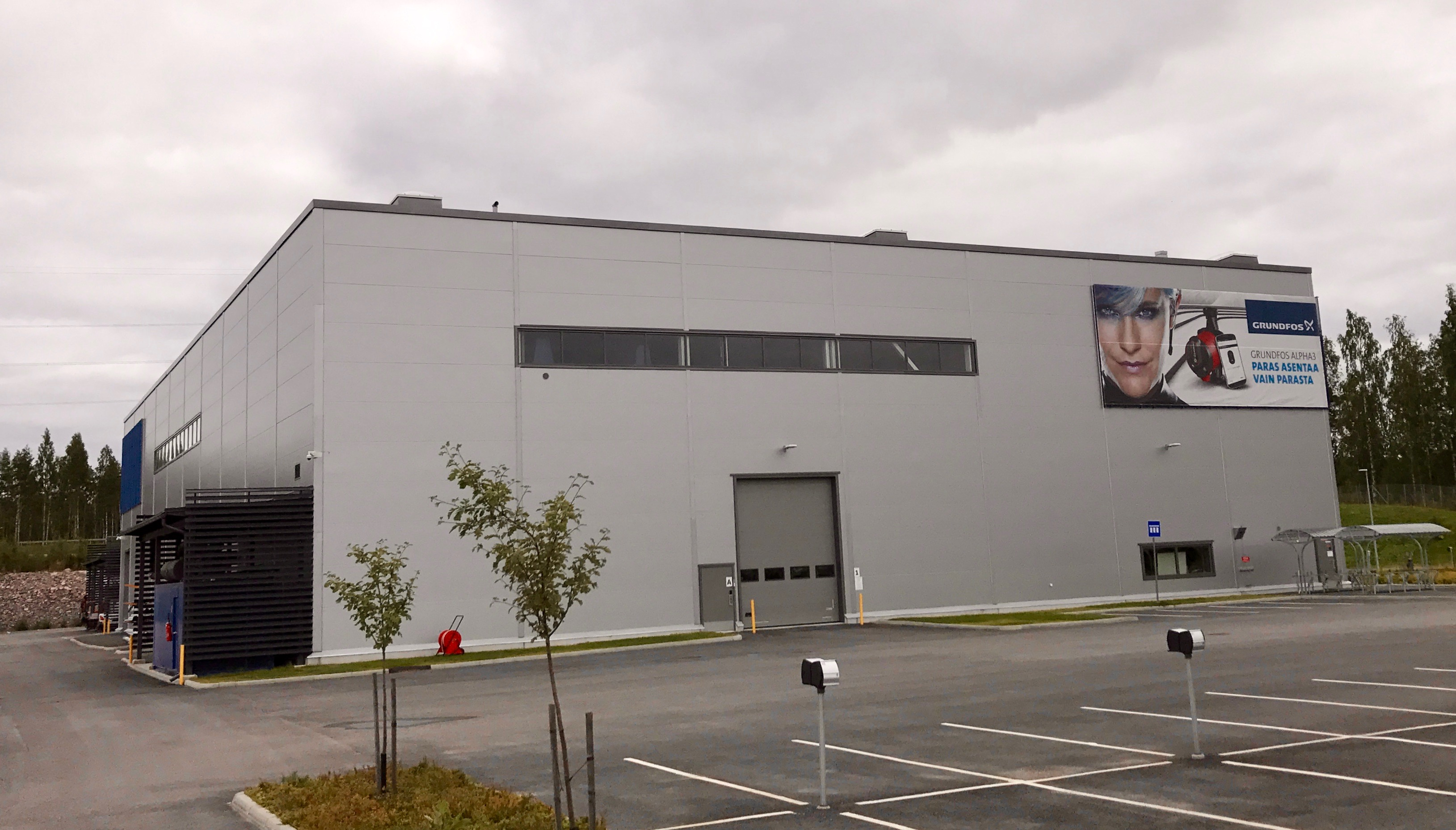 Oy Grundfos Pumput Ab pääkonttori Vantaalla.